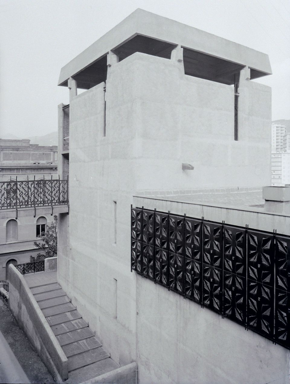 Servizio fotografico : Genova, 1960 / Paolo Monti. - Buste: 47, Fototipi: 49 : Negativo b/n, gelatina bromuro d'argento/ pellicola ; 10x12. - ((Serie costituita da 47 buste sciolte di negativi identificati con una doppia numerazione (da 1 a 59): 1799, 1800, 1801, 1802, 1803, 1804, 1805, 1806, 1807, 1808, 1809, 1810, 1811, 1812, 1813, 1814, 1815, 1816, 1817, 1818, 1819, 1820, 1821, 1822, 1823, 1824, 1825, 1826, 1827, 1828, 1829, 1830, 1831, 1832, 1833, 1834, 1835 (D[duplicato-46], 1836, 1837, 1838, 1839, 1840, 1841, 1842, 1843, 1844, 1845, 1846, 1847, 1848, 1867. - Sulla busta identificata con il n. 1800 iscrizione didascalica manoscritta a pennarello. - Le buste identificate con i nn. 1799 e 1867 sono le uniche senza doppia numerazione. - Sul coperchio della scatola iscrizione documentaria manoscritta a pennarello nero: "Casabella". - Occasione: Documentazione per pubblicazione su periodico "Casabella", Milano, Domus. - Fonte: Rubrica di Paolo Monti: Archivio 10x12 (ultimi numerati) - dal G1 al (s.d.), presso Archivio Paolo Monti. - Fonte: Monografia di Fleming John, Honour Hugh, Pevsner Nikolaus: Dizionario d'architettura, Torino, Einaudi (1981). - Fonte: Periodico: Casabella, Milano, Domus (s.d.). - Fonte: Fogli pinzati di Paolo Monti: I. Carteggi/ Einaudi/ Elenco foto disponibili per il Dizionario di Architettura (s.d.), presso Archivio Paolo Monti